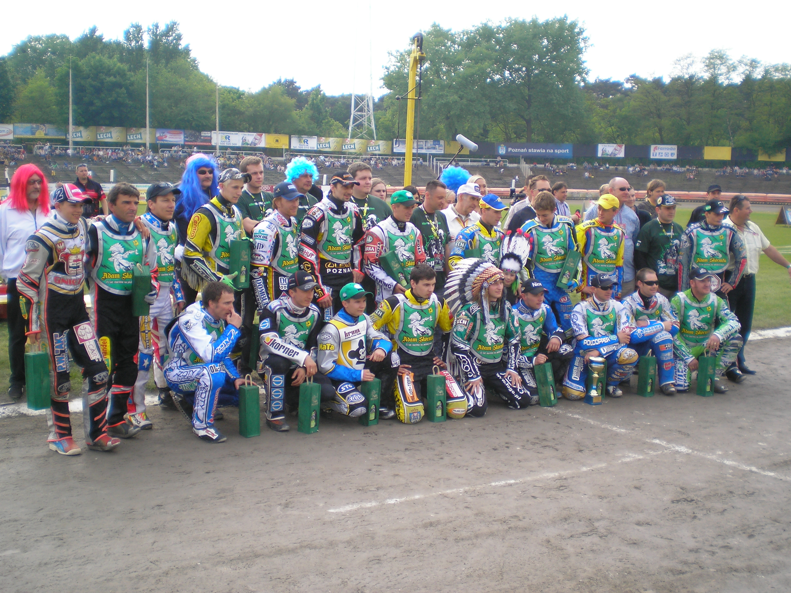 15-lecie startów na polskich torach Adama Skórnickiego w Poznaniu